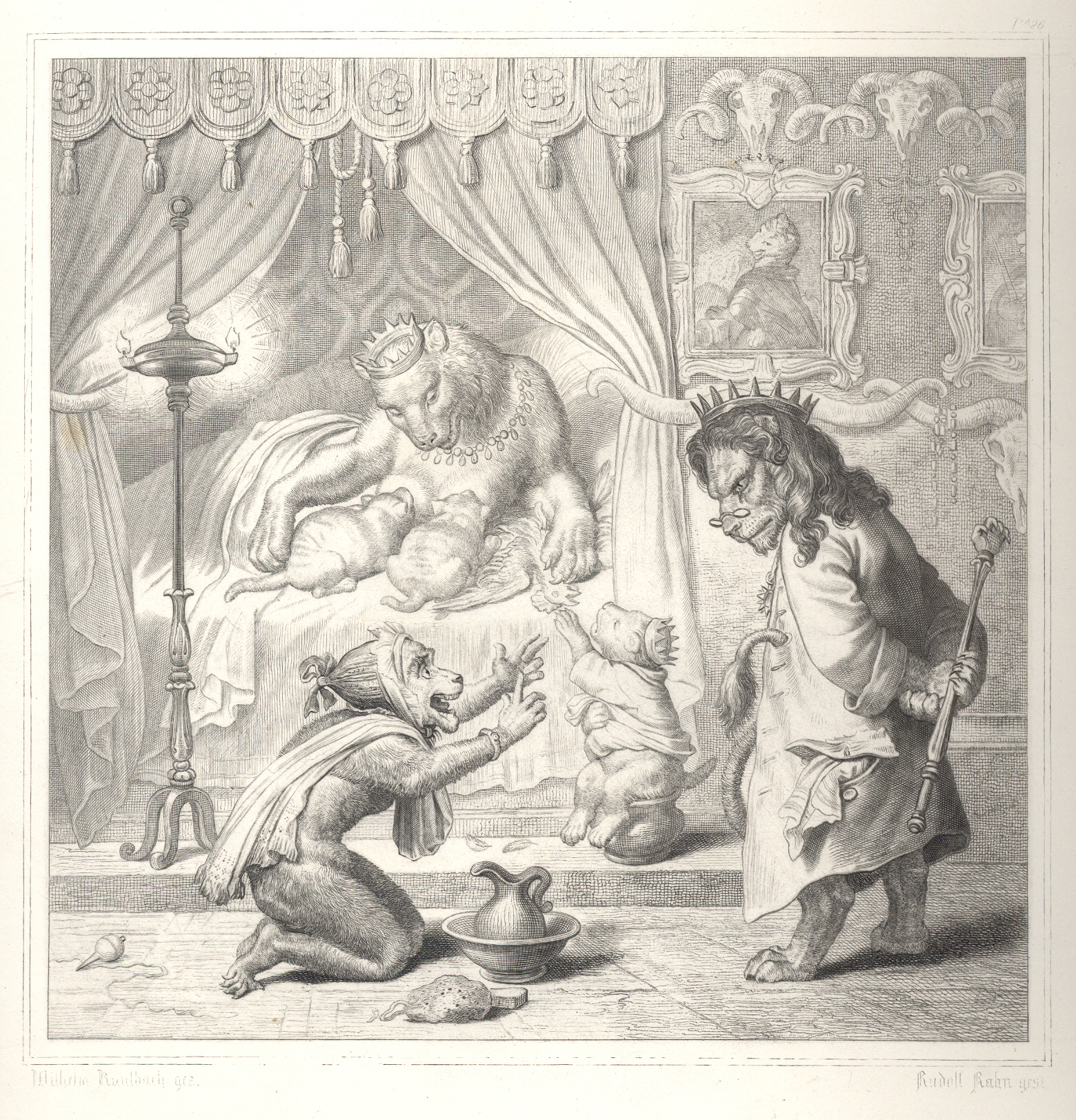 Wilhelm von Kaulbach: In König Nobels Schlafgemach. In Kupfer gestochen von Rudolf Rahn